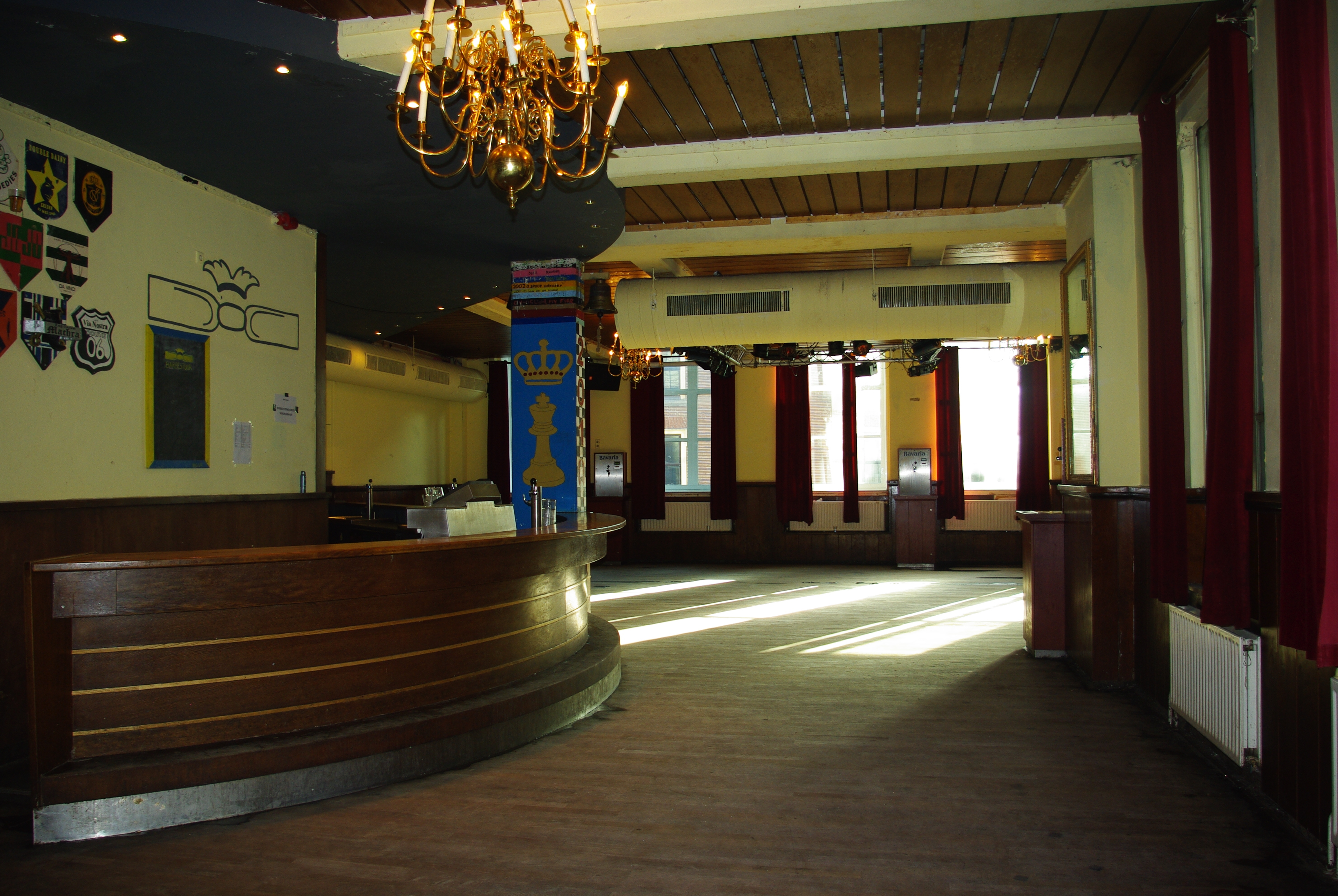 Societeit Quintus Raevenzaal